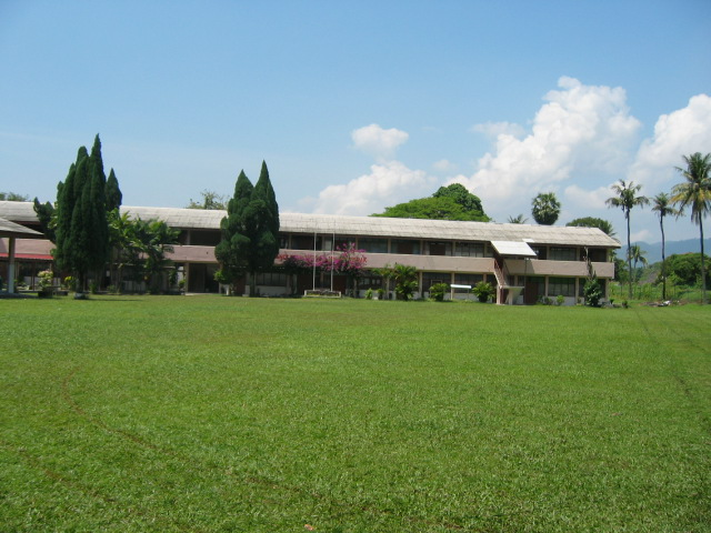 Blok Utama